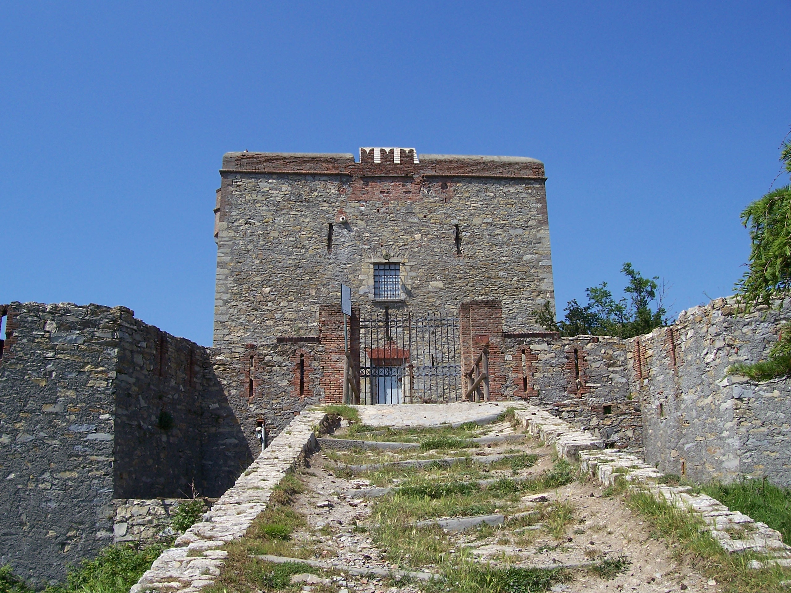 Genova - Forti di Genova, Forte Puìn Fotografia di Daniele Campi Martucci